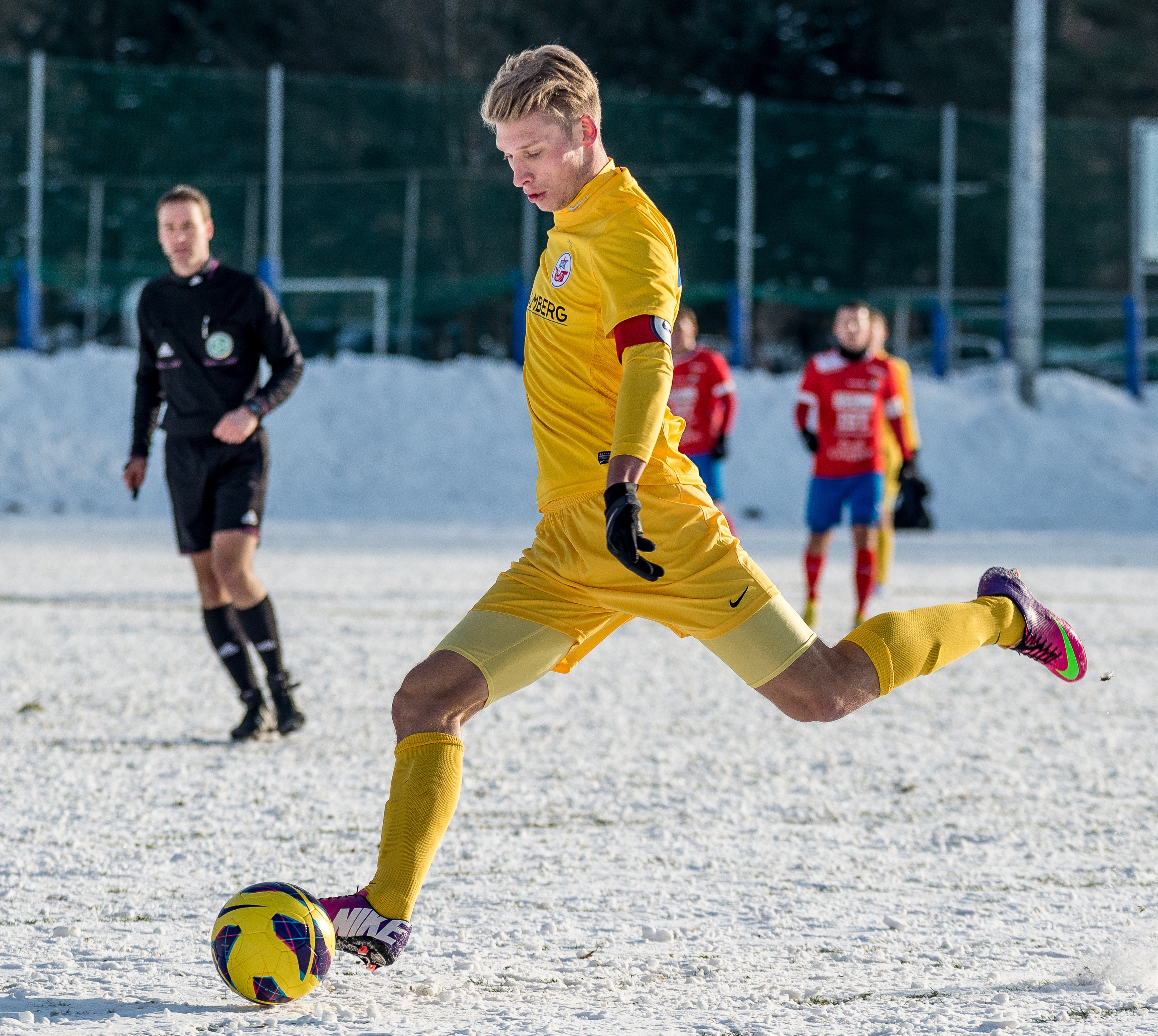 Hansa Rostocks Michael Blum i en träningsmatch mot Östers IF 19/1 2013.